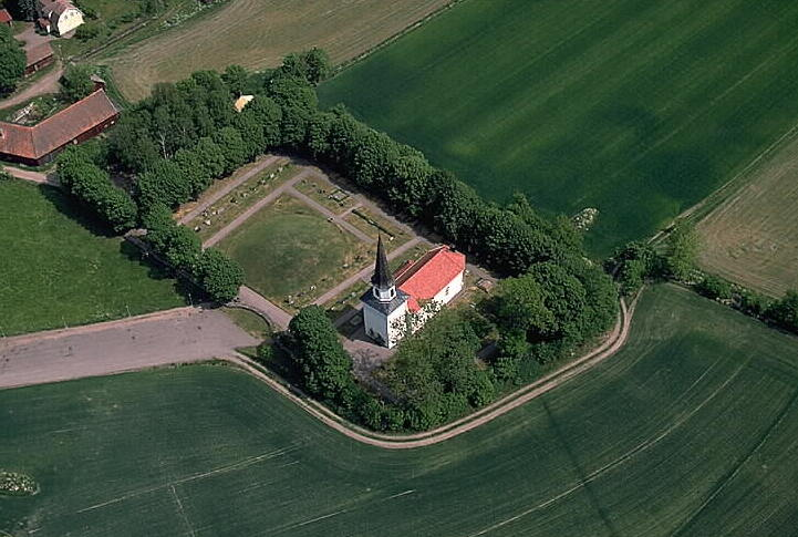 Storhögen "kung Ranes hög" (fornlämningsnummer, RAÄ 12:1) i bildens mitt. Motiv: Flistads kyrka och storhög Nyckelord: Flygbilder, Riksintressen Kategori: Kyrkomiljö, Hög Storhögen "kung Ranes hög" (fornlämningsnummer, RAÄ 12:1) i bildens mitt.